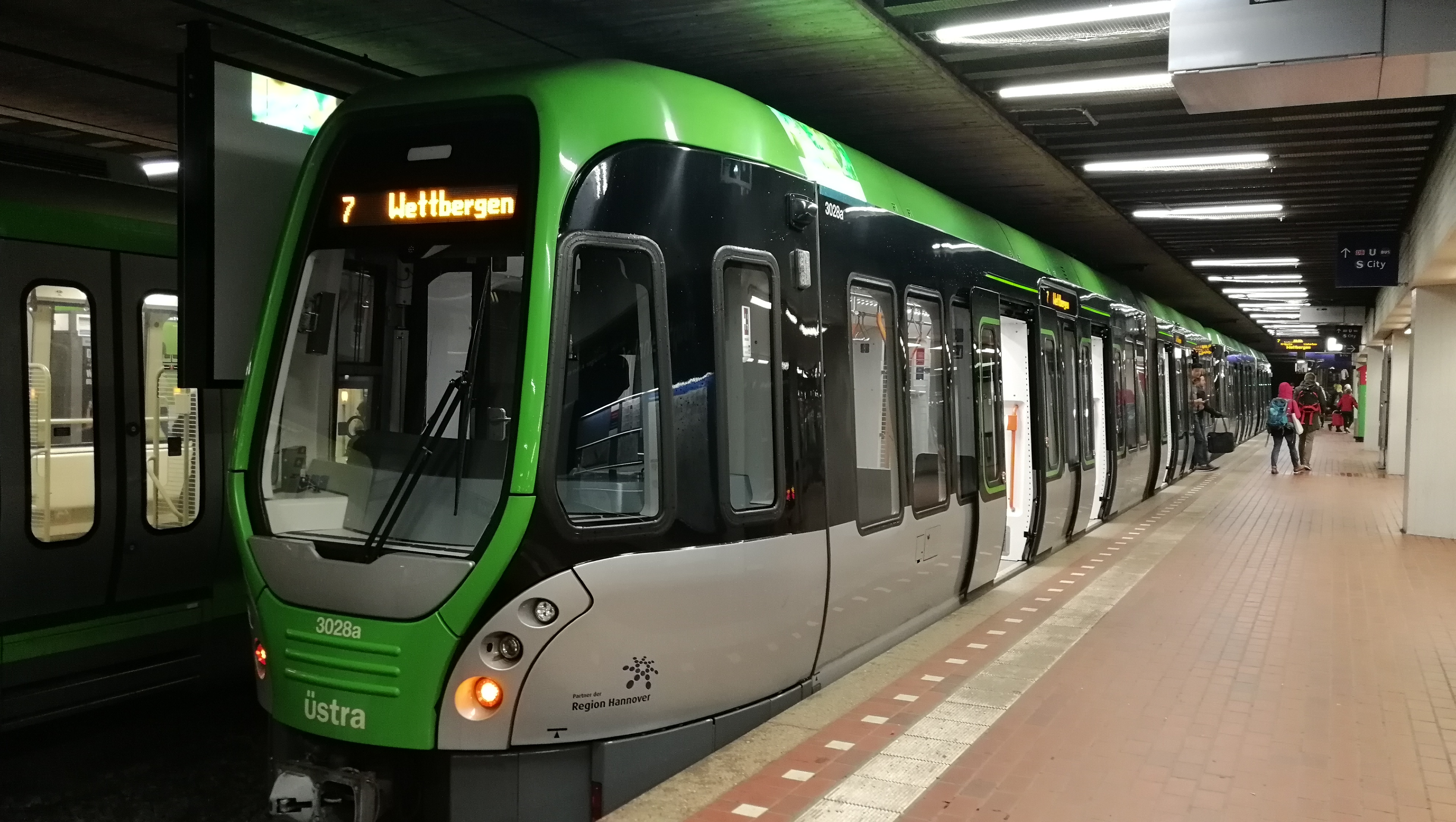 Ein Stadtbahn-Zug des Typs TW 3000 der Hannoverschen Verkehrsbetriebe Üstra an der unterirdisch gelegenen Station Hauptbahnhof.